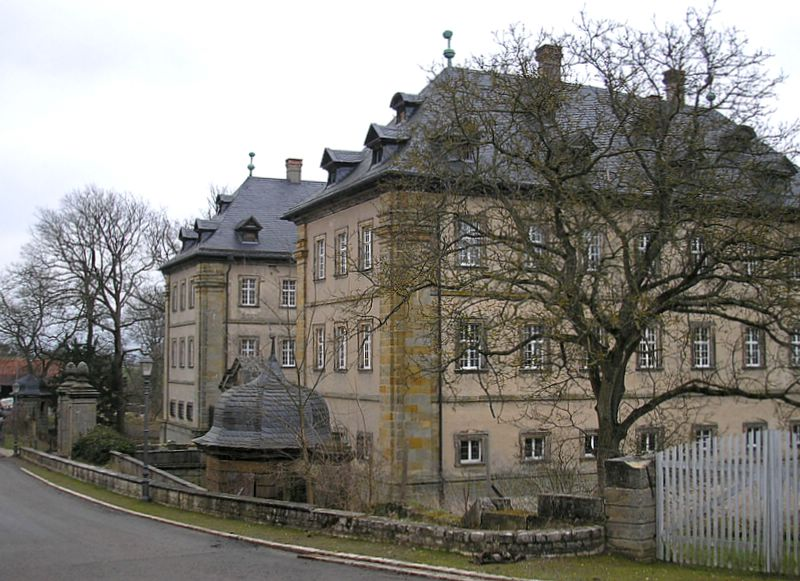 Schloß Gereuth (Unterfranken). Nordwestansicht.